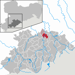 Zschopau im Erzgebirgskreis, Sachsen